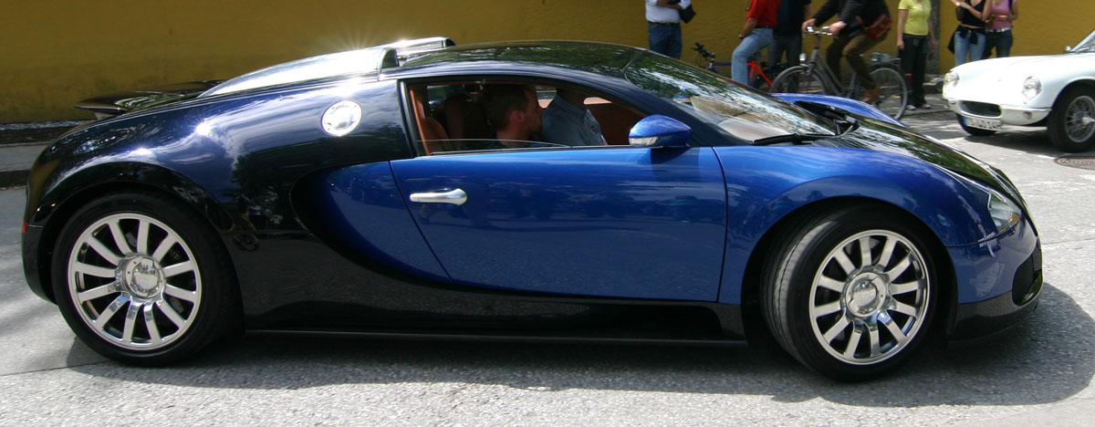 Bugatti Veyron